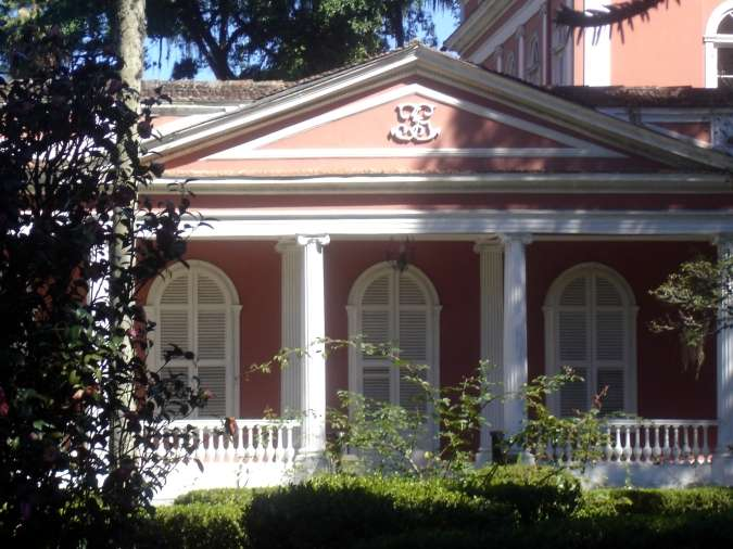 Casa da Princesa Isabel em Petrópolis, Rio de Janeiro, Brasil. Foto: JorgitoBoucas